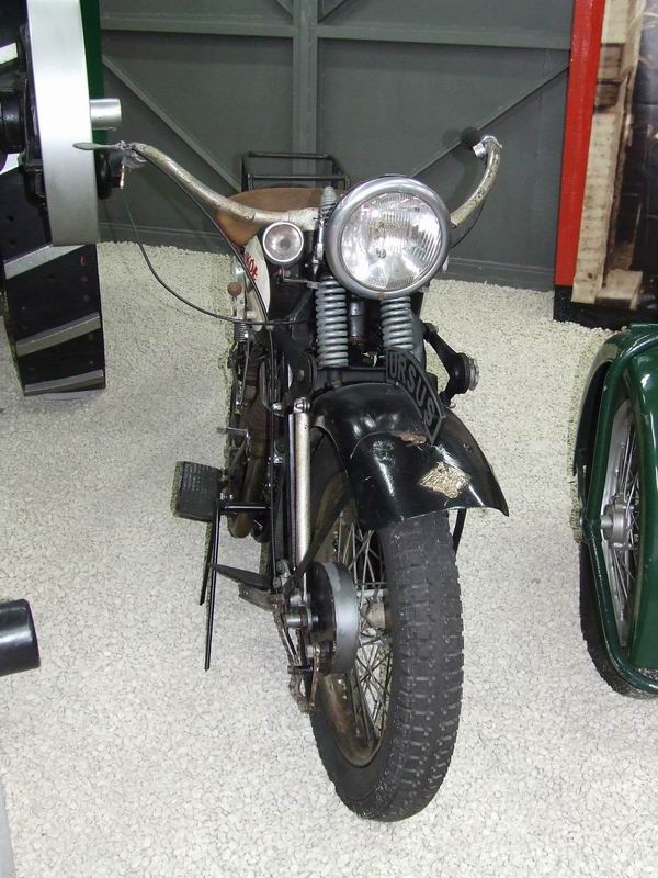 Polish motorcycle Sokół 1000.